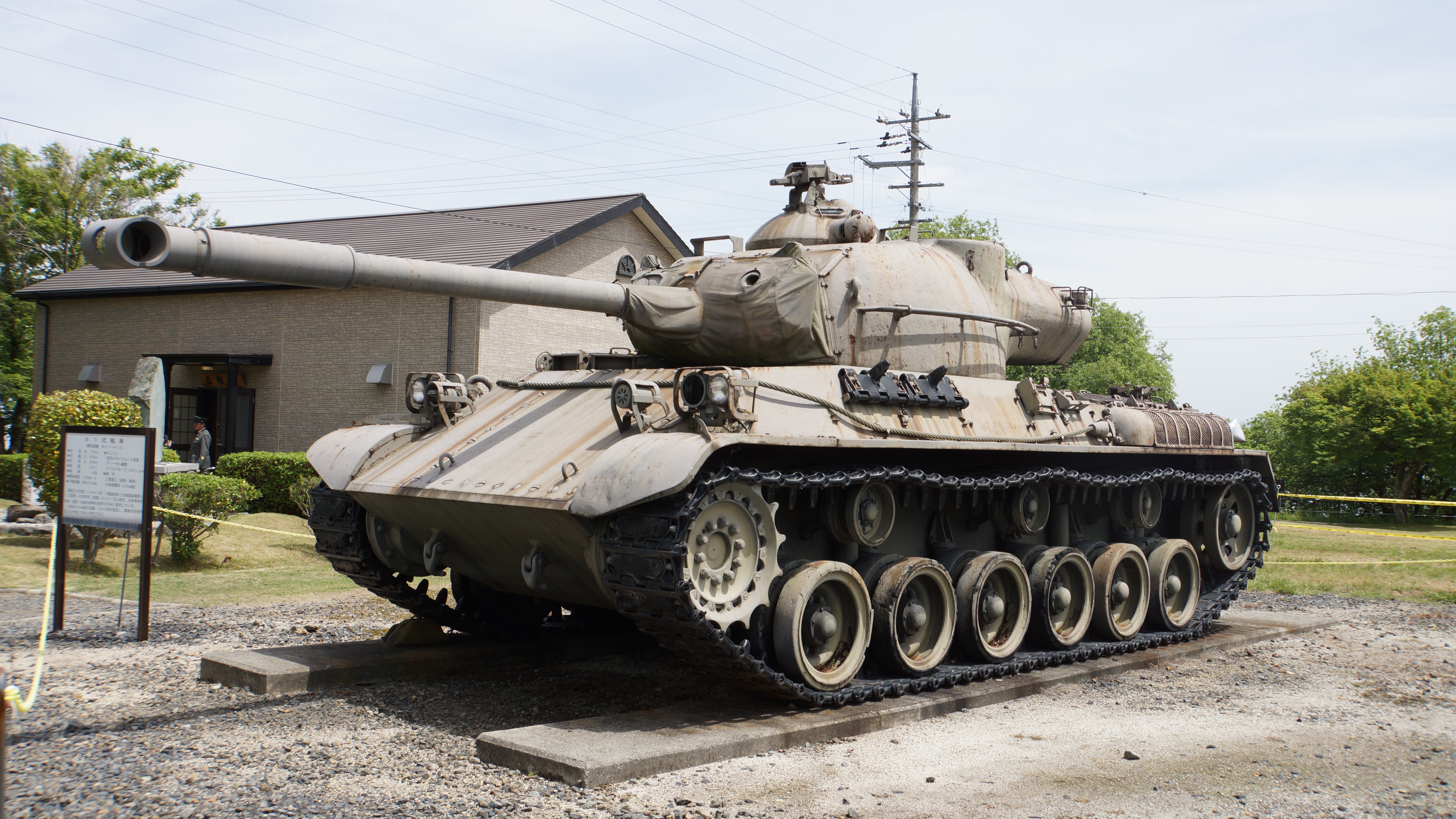 陸上自衛隊 61式戦車。 2016年5月8日 大津駐屯地にて。